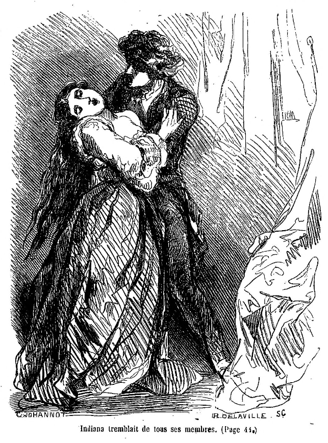 Illustration de Tony Johannot pour une réédition du roman "Indiana" de George Sand chez Hetzel (Paris) en 1861. "Indiana tremblait de tous ses membres." (Page 41.)